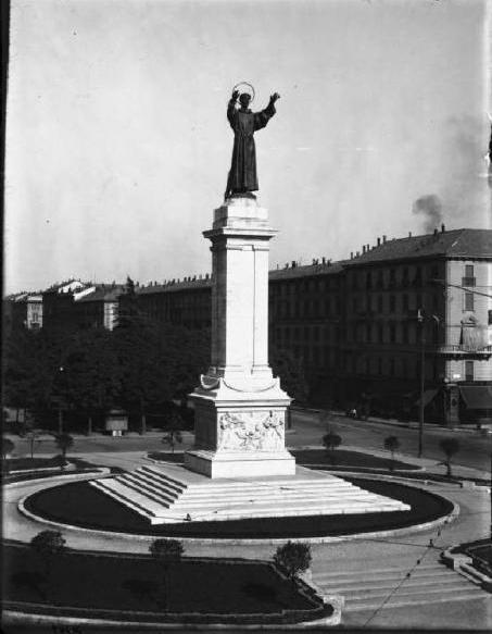 anni 40ca Panoramica della piazza